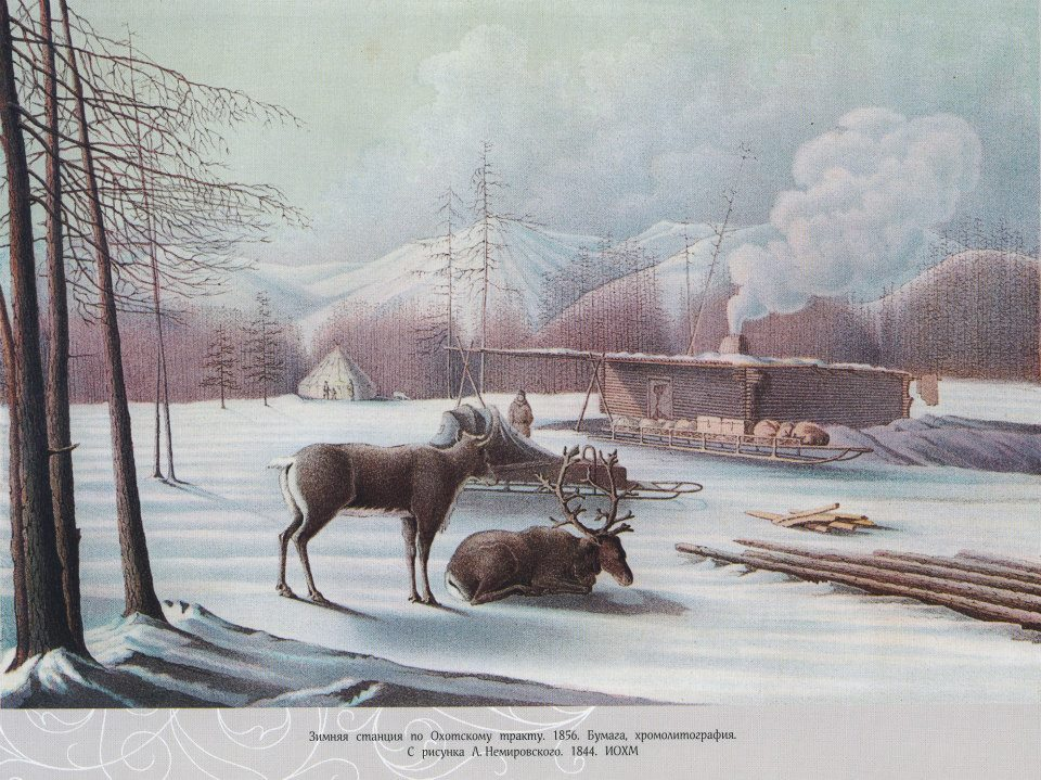 Леопольд Немиро́вский. Зимняя станция по Охотскому тракту.